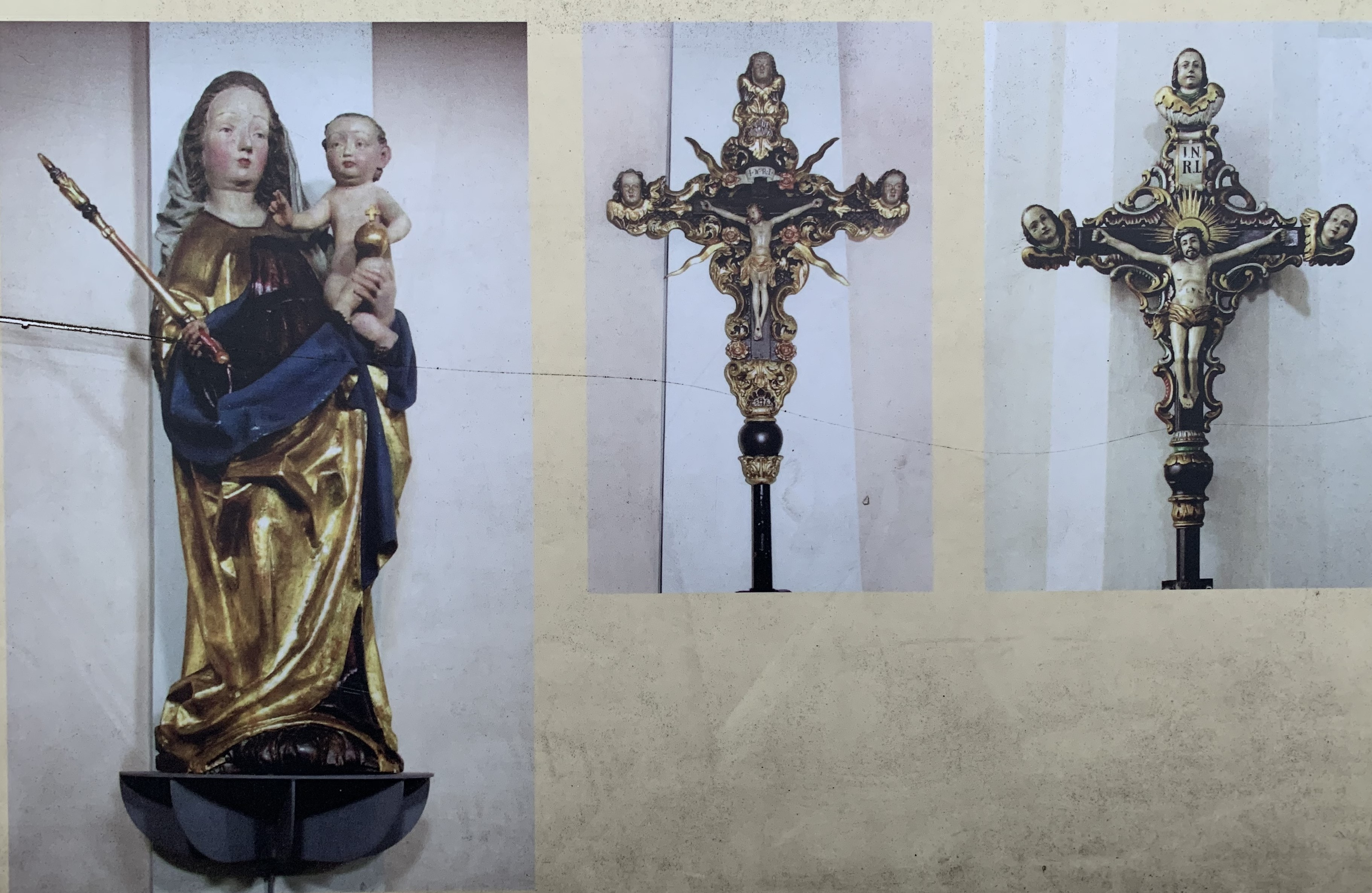 Die Stadtkirche St. Andreas entstand in den Jahren 1859 bis 1863 und befindet sich in Selb im Landkreis Wunsiedel in Bayern. Aufnahme einer öffentlich zugänglichen Informationstafel der Kirchengemeinde vor dem Westportal der Kirche in Selb.